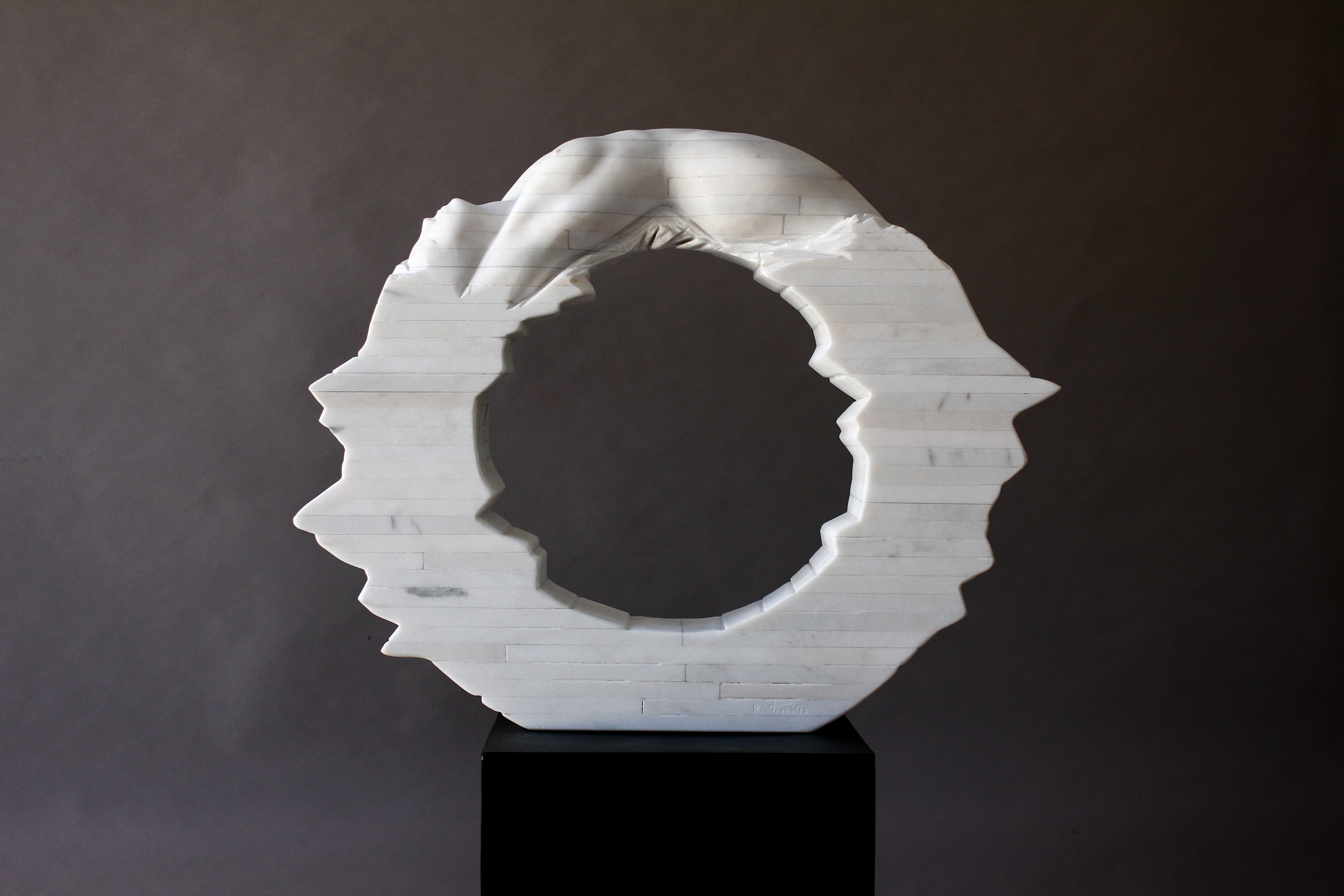 Escultura em mármore "Tágide" do Escultor Rogério Timóteo